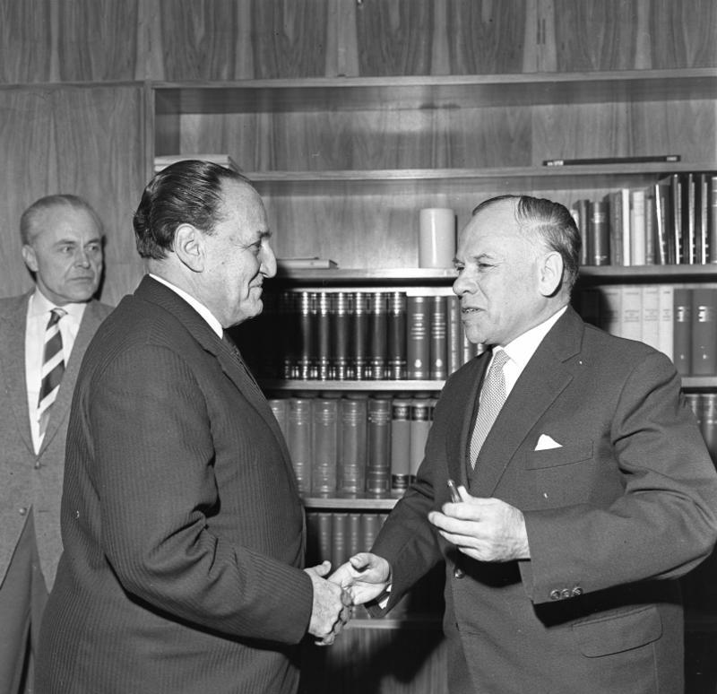 Empfang des peruanischen Regierungsmitglieds, Haya de la Torre, durch den Bundestagspräsidenten Dr. Gerstenmaier Haya de la Torre ist der Gründer der peruanischen Partei ARPA